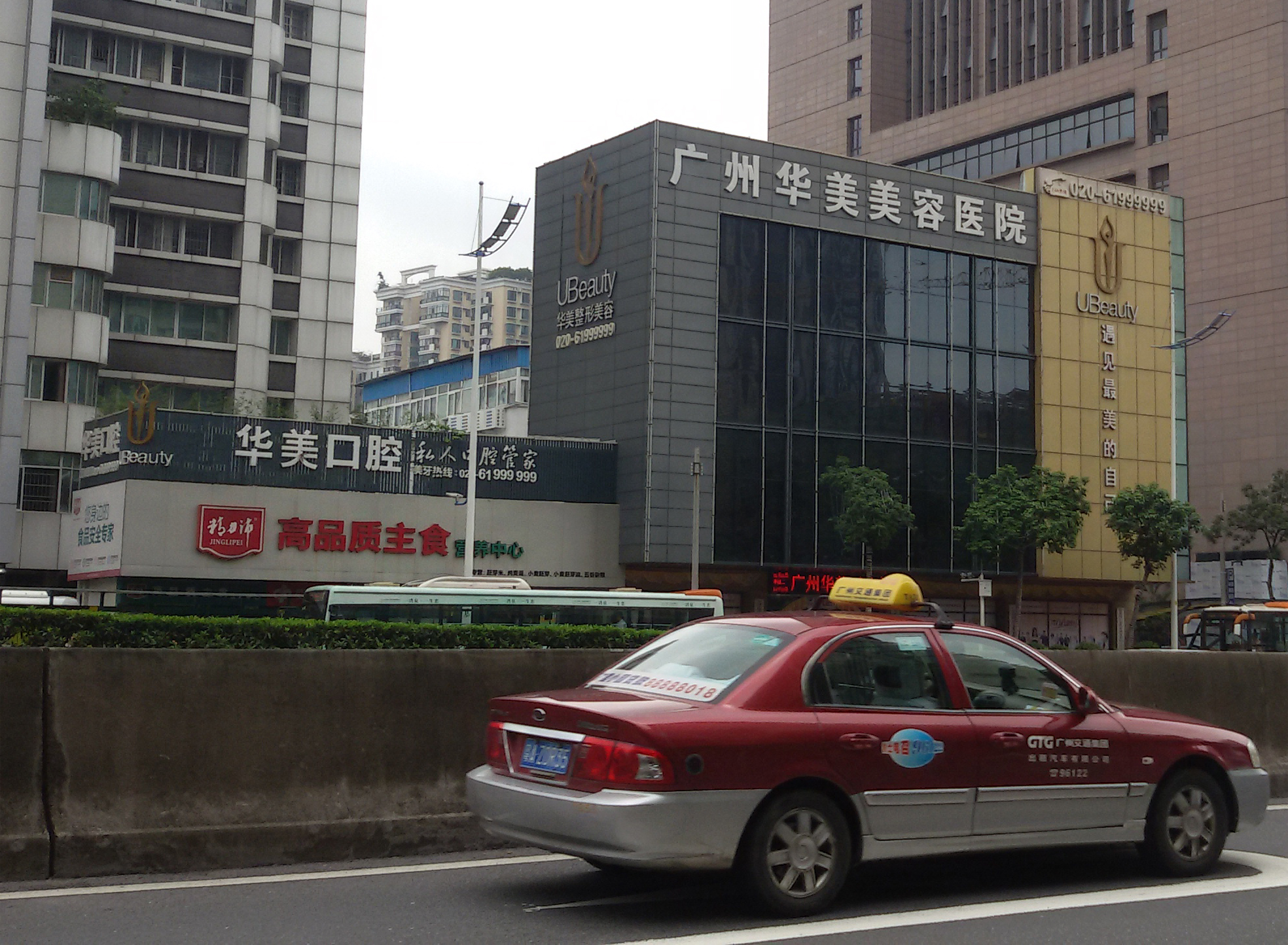 粵語: 廣州華美醫療美容醫院